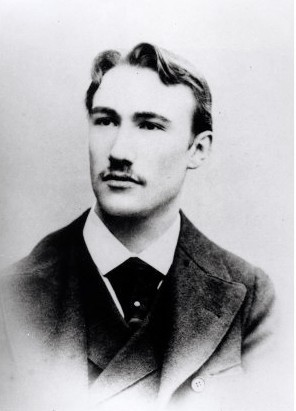 Photo en studio d'André Gide, vers 1890. Photographe non déterminé.